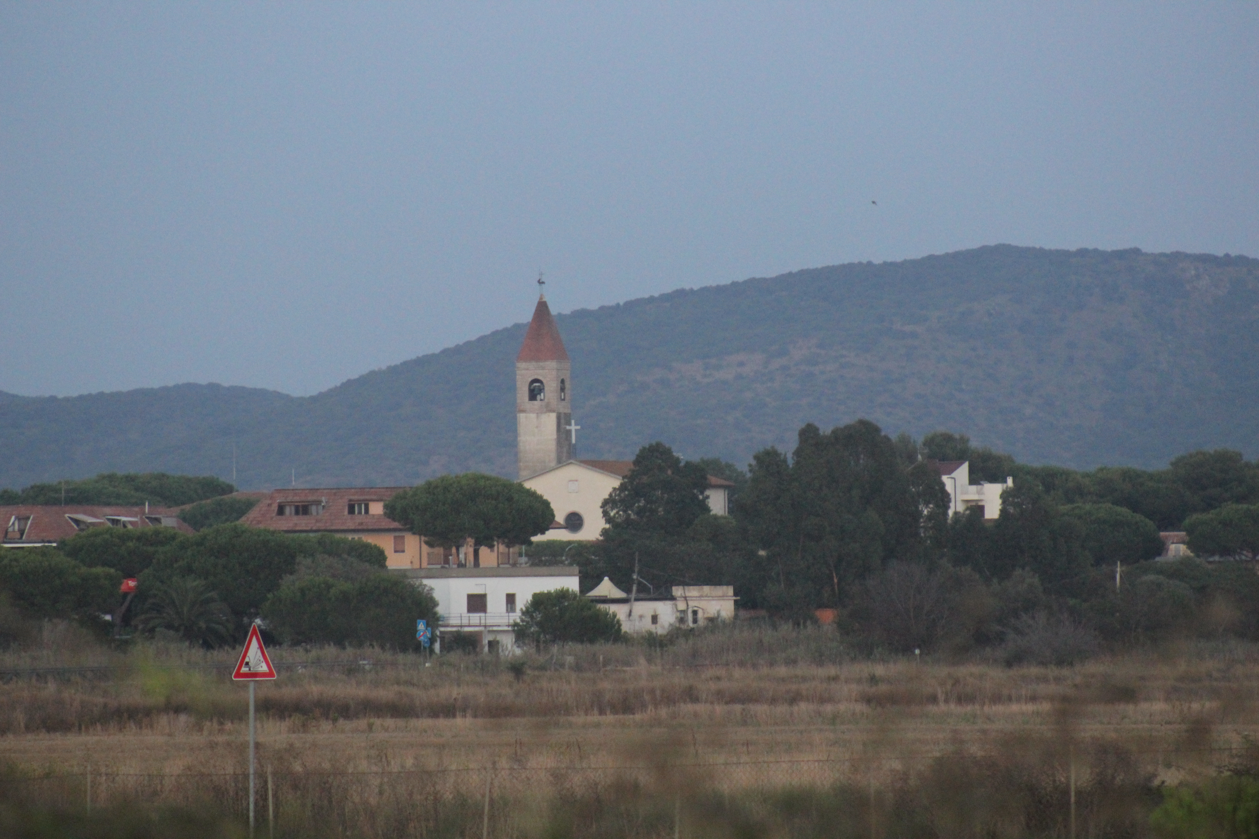 Maria Santissima delle Grazie ad Albinia